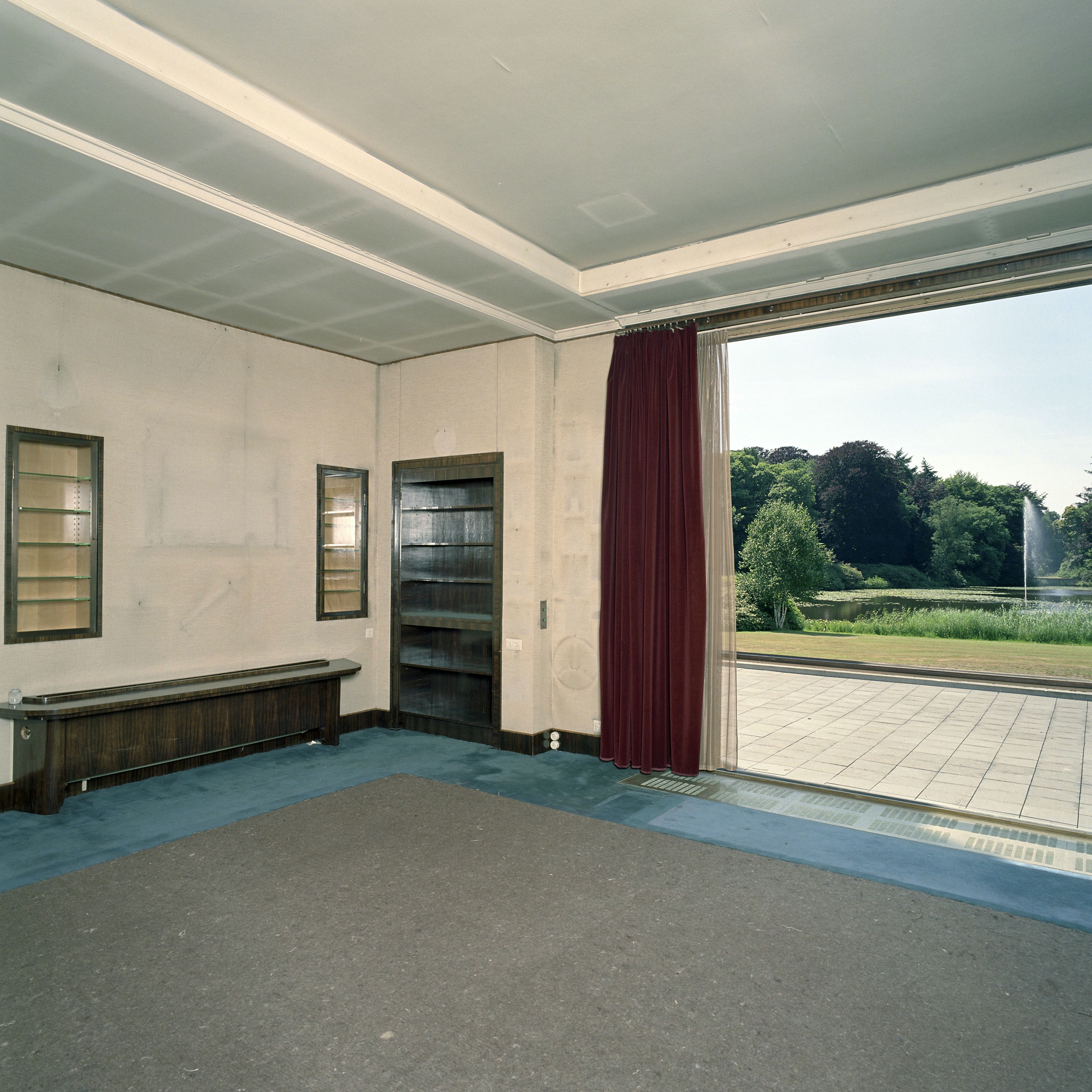 Paleis Soestdijk: Interieur, overzicht van de lege zit/werkkamer van Prins Bernhard met zicht op het terras en park , gelegen aan de achterzijde van het corps de logis